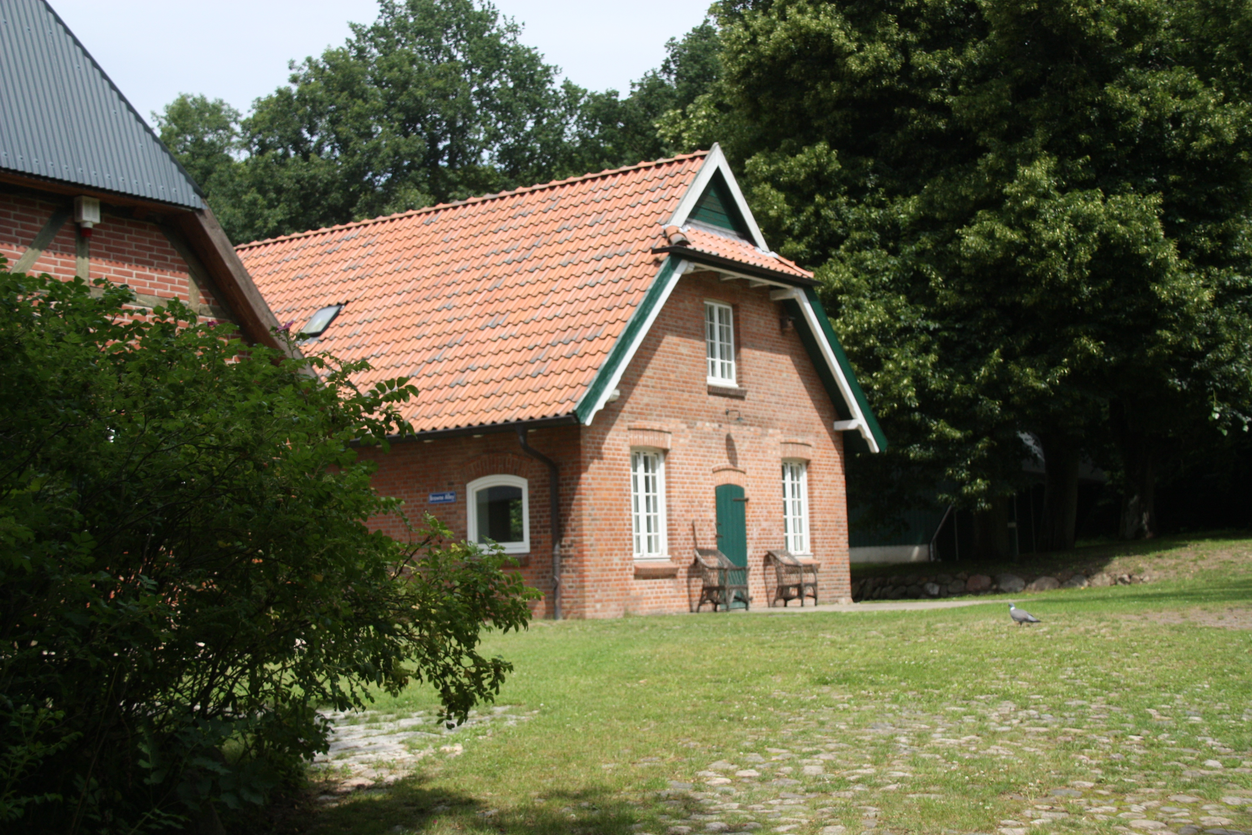 Trittau, Sonnenhof, kleines Wirtschaftsgebäude